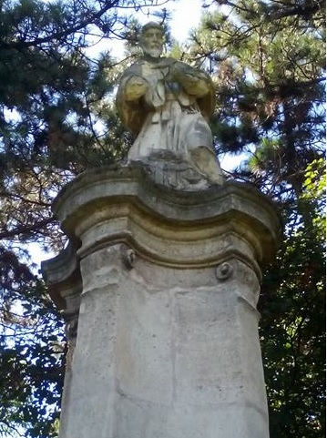 Xavéri Szent Ferenc mészkőszobra (1769) – Budapest, XI. kerület. Budaörsi út 77. (Amerikai temető)